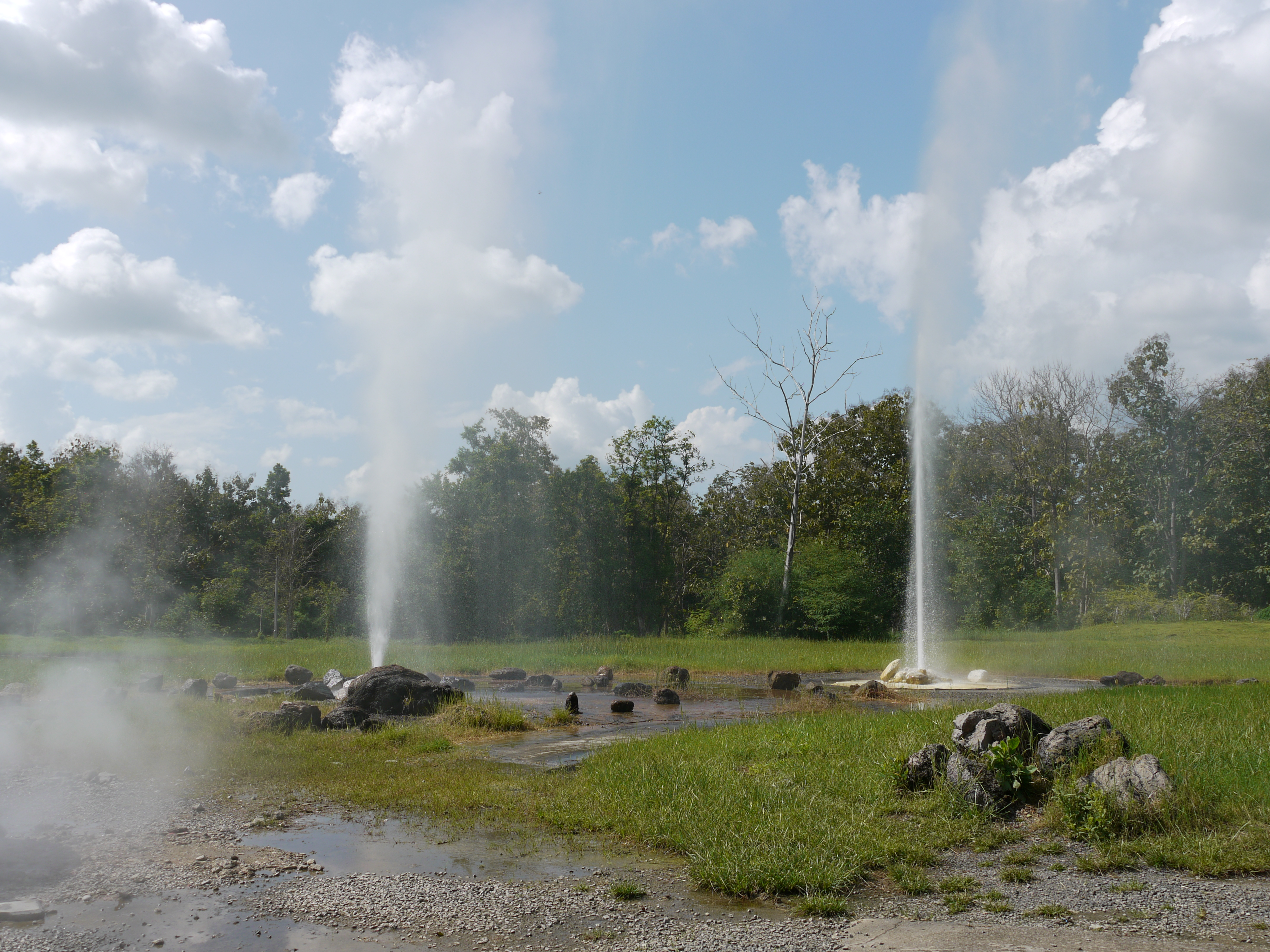 De spuitende hete bronnen in het park.